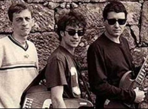 Los Feliz